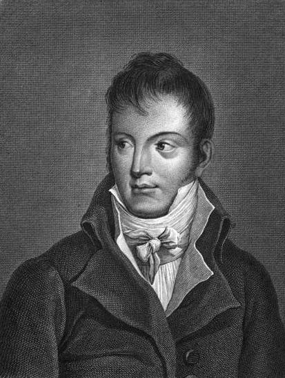 "Michel Ange Lancret"